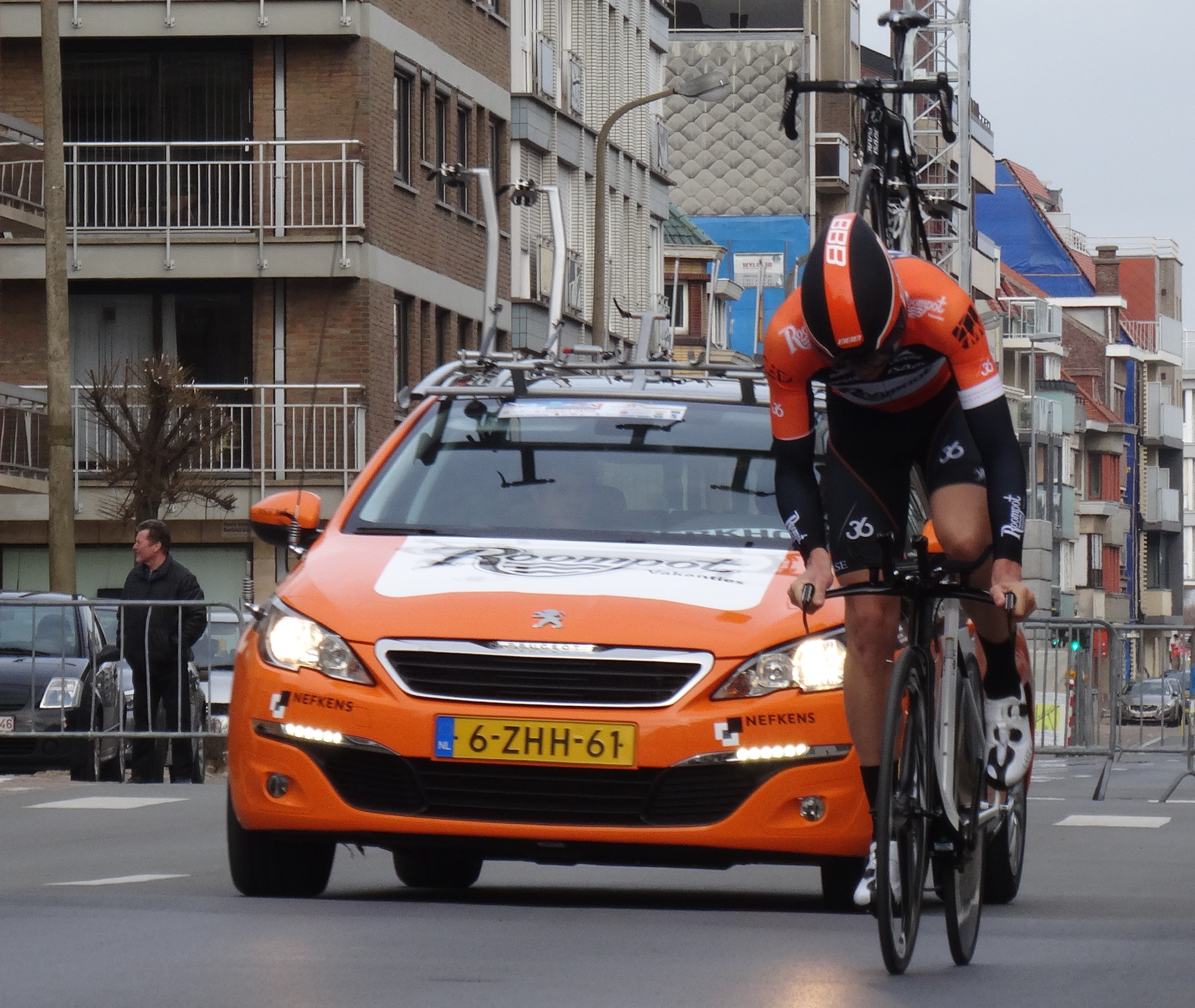 Reportage réalisé le vendredi 6 mars à l'occasion du contre-la-montre individuel du prologue des Trois jours de Flandre-Occidentale 2015 à Middelkerke, Belgique.